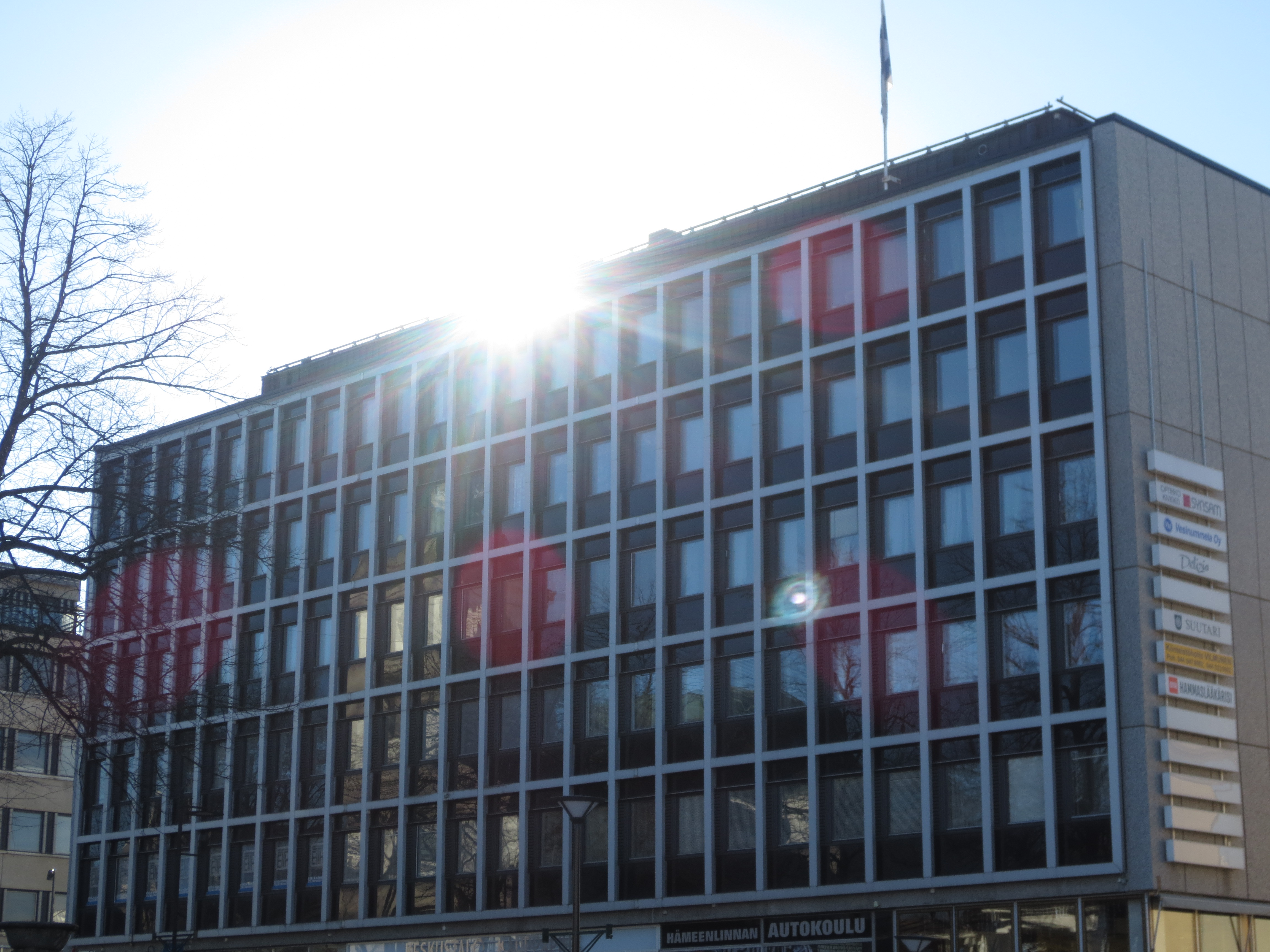 Keskustalo kauppatorin puolelta